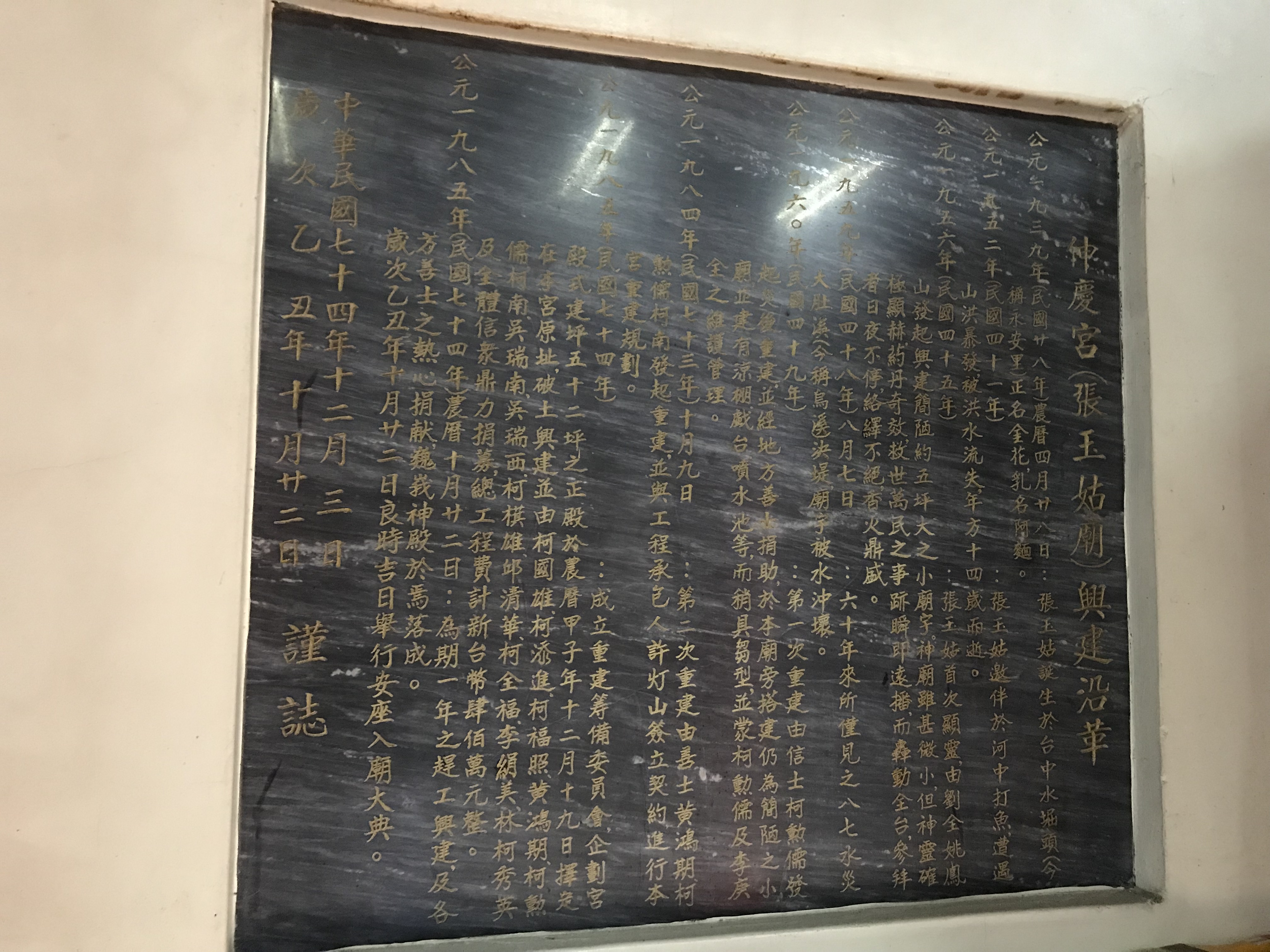 伸慶宮沿革